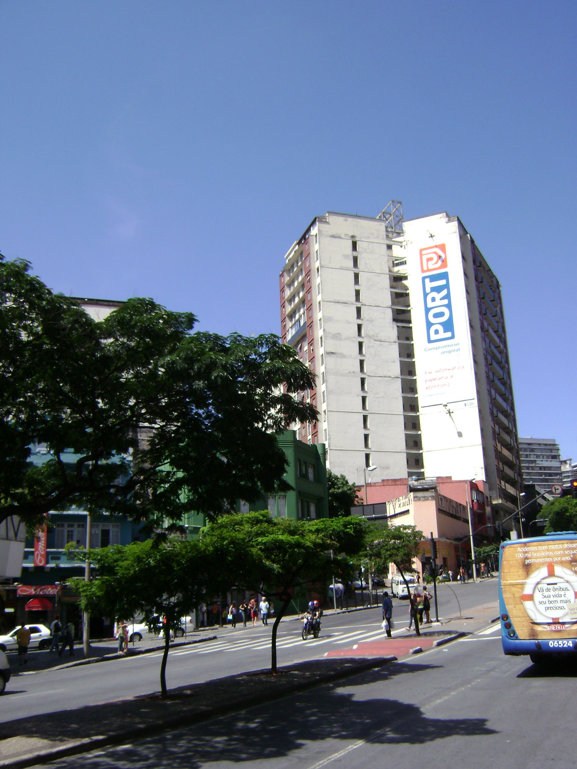 Banner (propaganda) em fachada de edifício na Avenida Amazonas, Belo Horizonte, Brasil.